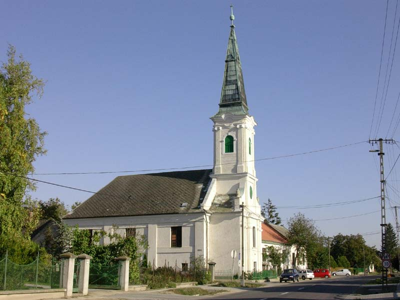 Kajászó - református templom (1802–1812) - saját fotó